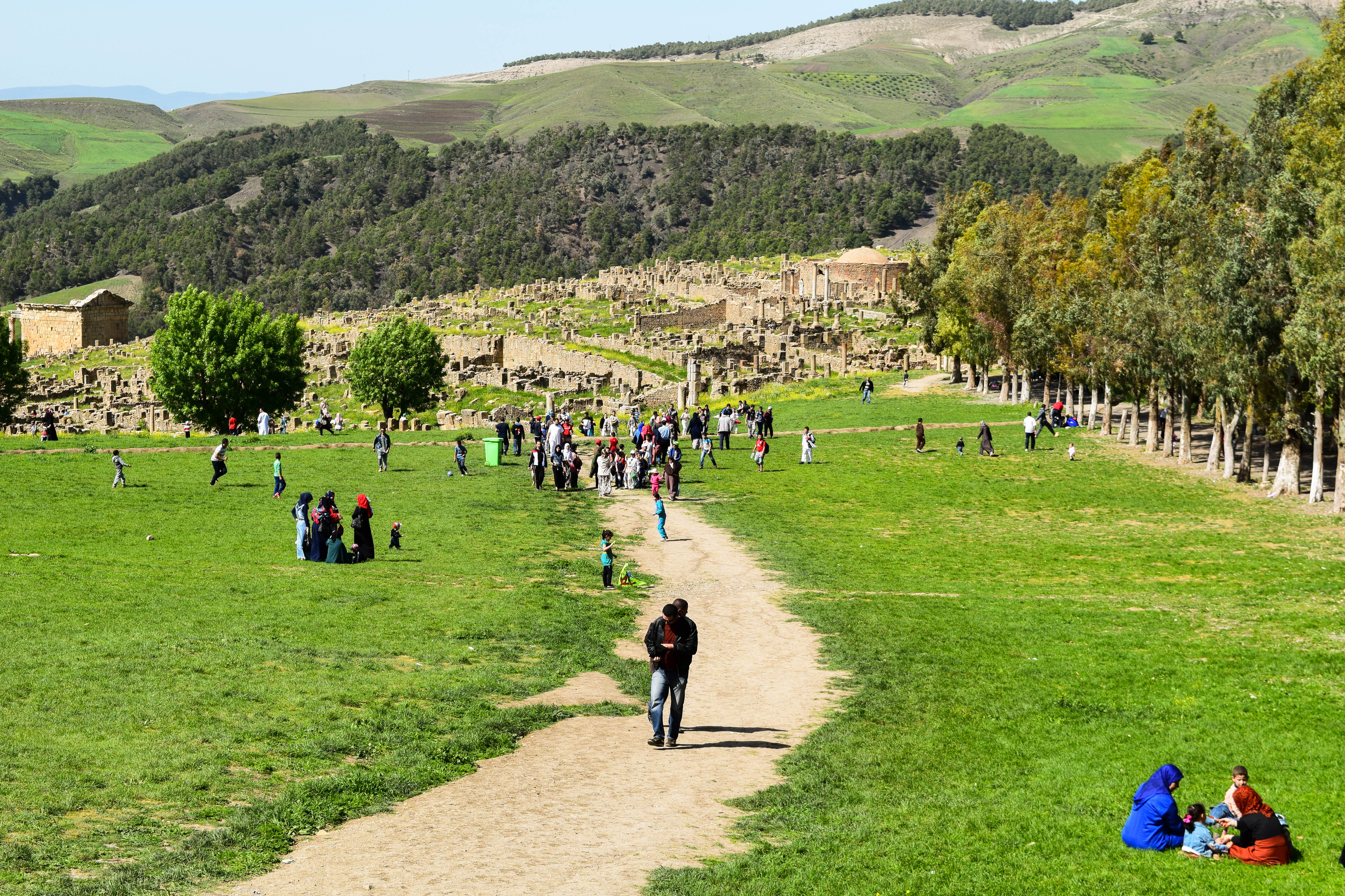 تعد مدينة جميلة ذات الآثار الرومانية الواقعة في ولاية سطيف والمصنفة على قائمة التراث العالمي من قبل منظمة اليونيسكو مدينة ساحرة جمعت بين العراقة والطبيعة